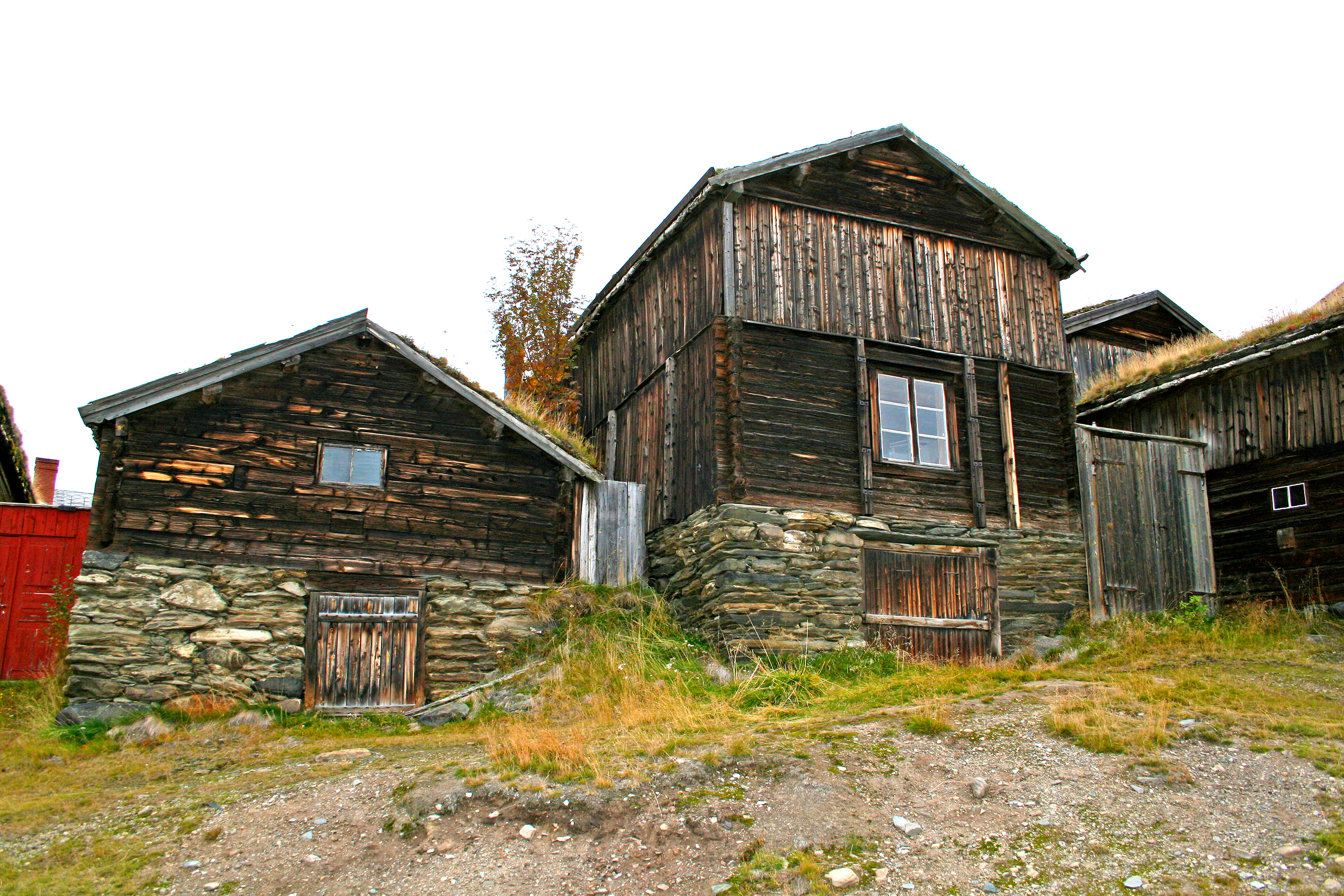 Kjerkgata 51 (Dillegården) og 53: Uthusene på Dillegården (Kjerkgata 51) og Kjerkgata 53 er fredet. Bildet viser til venstre fjøset til Dillegården og til høyre fjøs og stall med uthus tilhørende Kjerkgata 53 (kilde: Fredede hus og anlegg 3. Røros bergstad, Sigrid Christie og Luce Hinsch (red.), utgitt av Riksantikvaren, Universitetsforlaget, 1983)